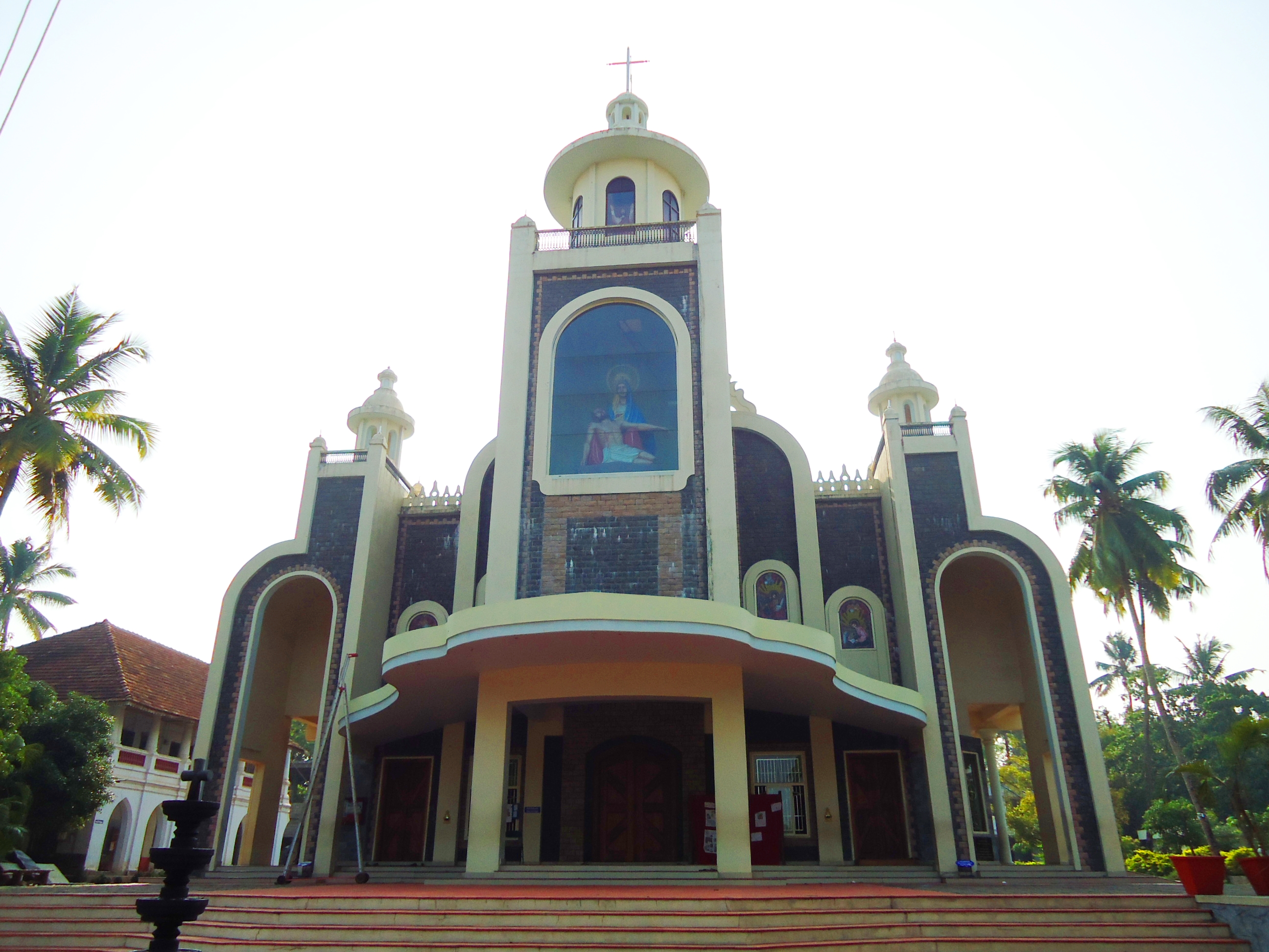 Mookknnoor Church